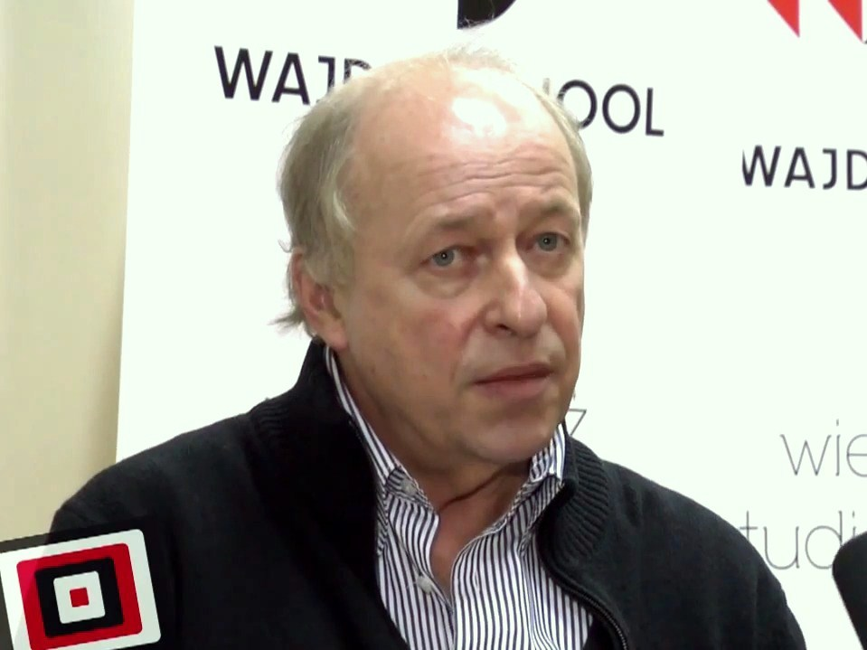 Wojciech Marczewski, reżyser i scenarzysta.